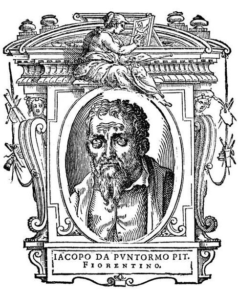 Jacopo Carucci